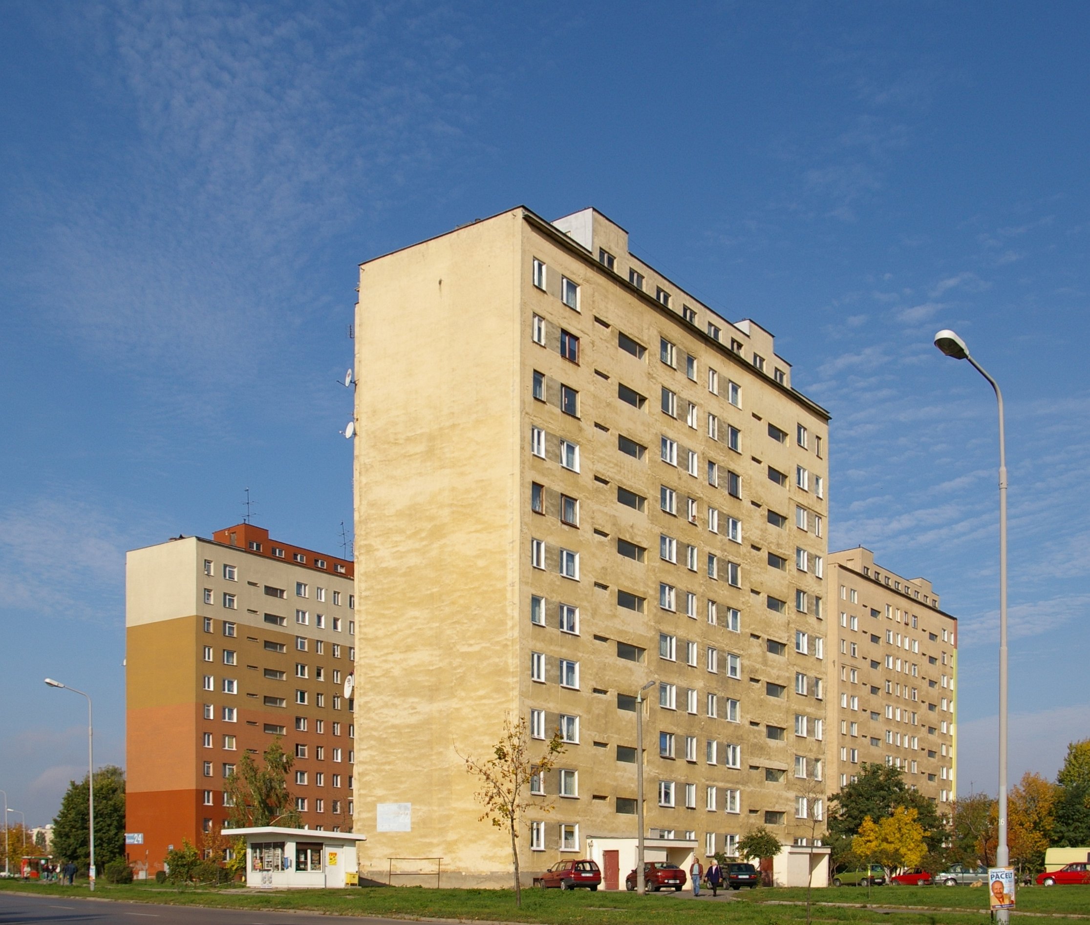 Bloki na osiedlu Ogrody w Ostrowcu Świętokrzyskim